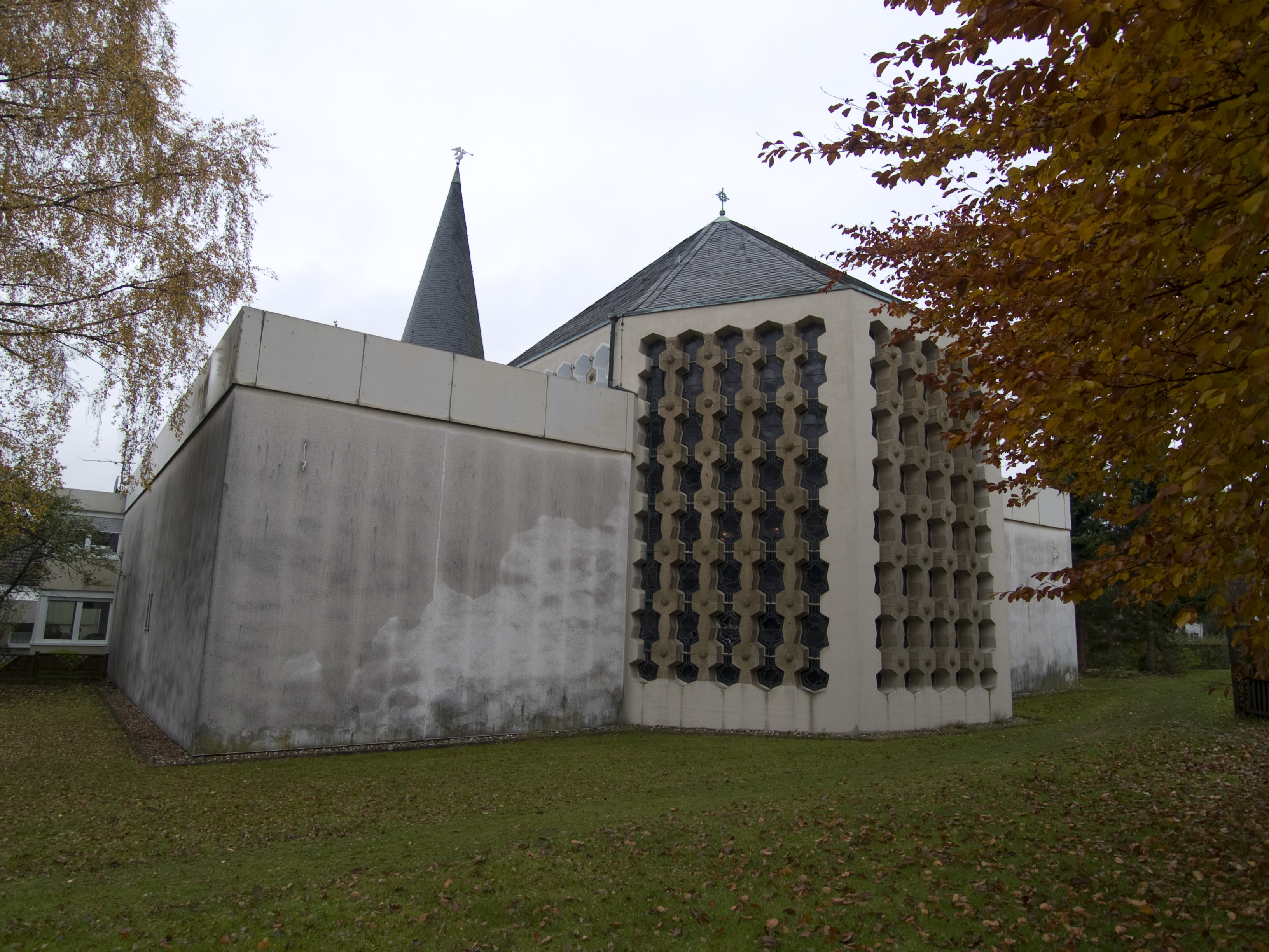 Kirche St. Josef in Kierspe, Architekt: Gottfried Böhm